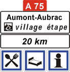 Panneau des Villages étapes - Aumont Aubrac